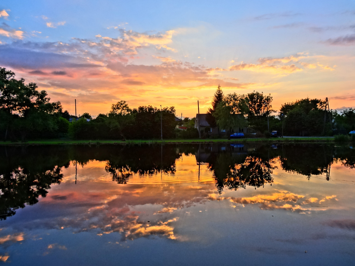 Staw na osiedlu Prądy w Bydgoszczy